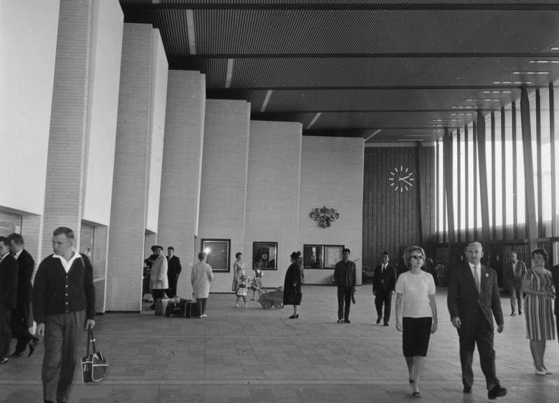 Braunschweig, im neuen Bahnhof